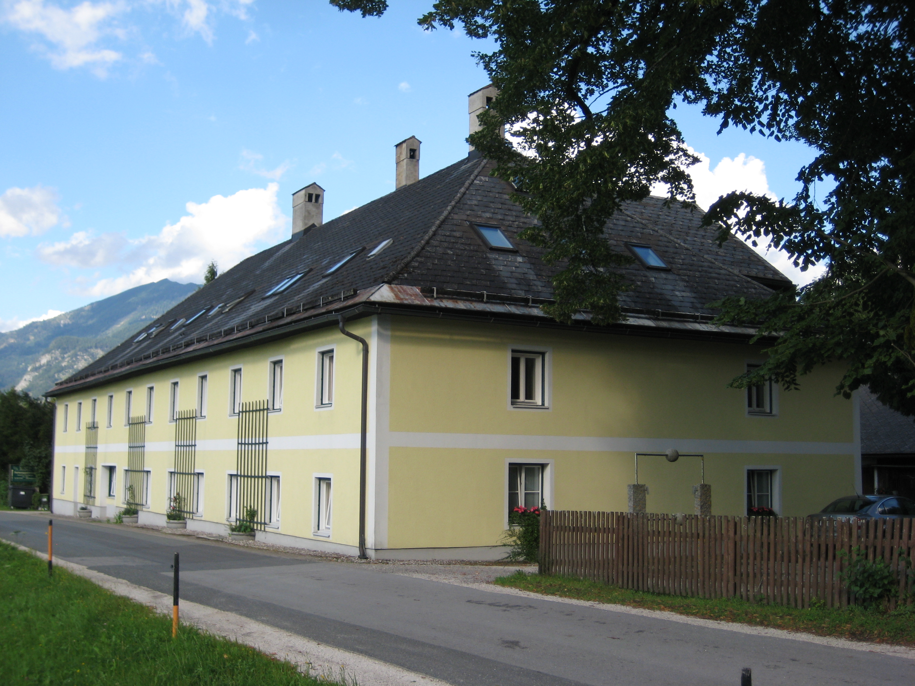 Schmiedehammer, ehem. Forsthaus